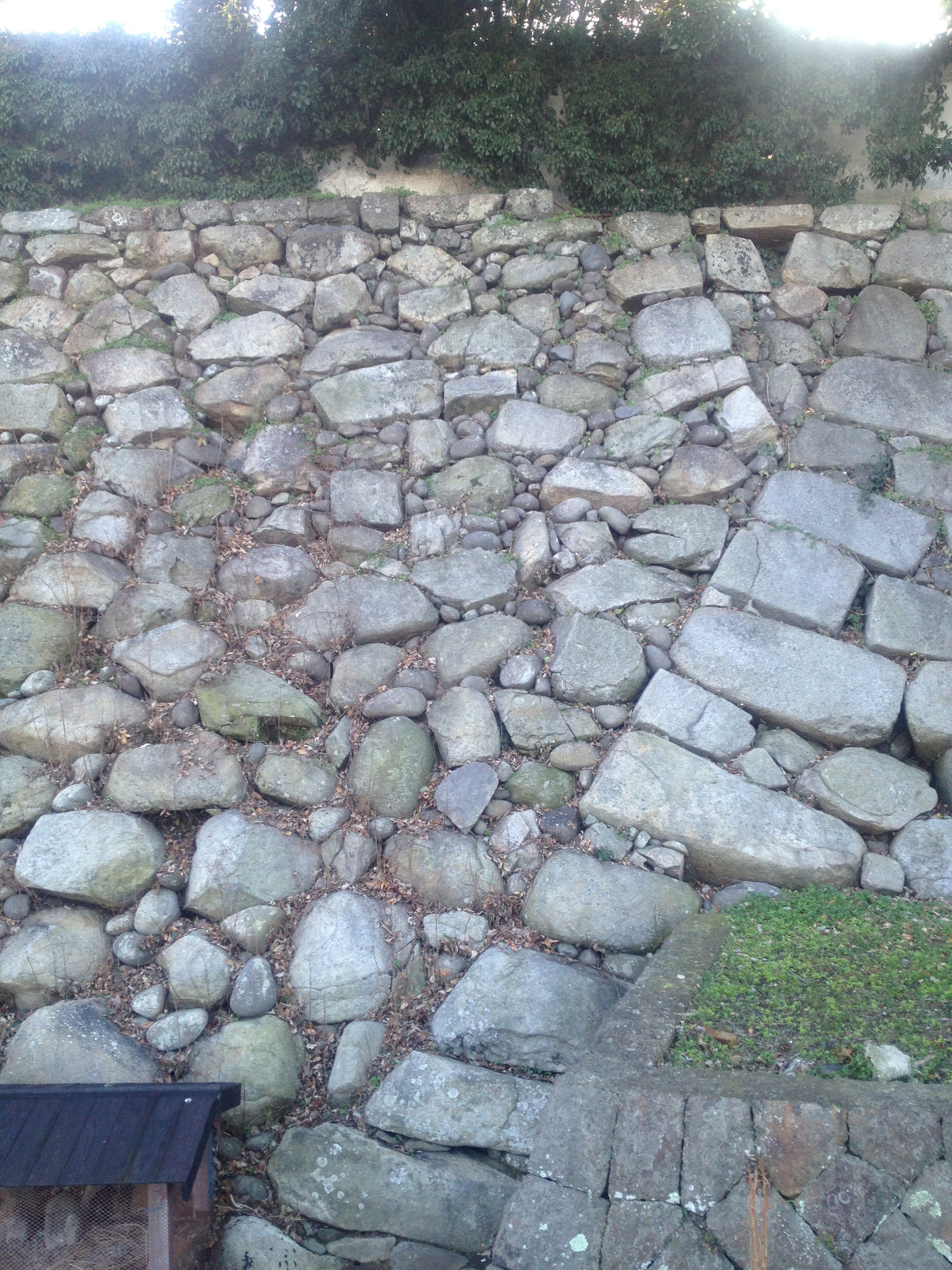 豊後国中津城本丸模擬天守の西にある積み方の異なる部分のある石垣。左が細川時代、右が黒田時代の石垣。